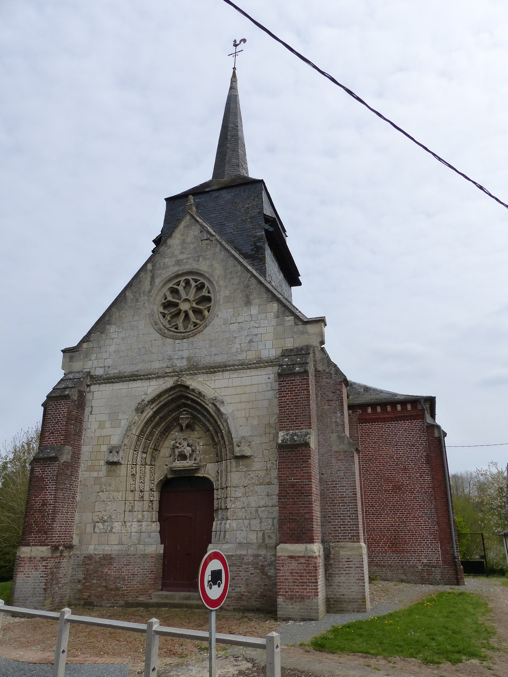 Frettemolle (Commune d'Hescamps) : L'église Saint-Martin.